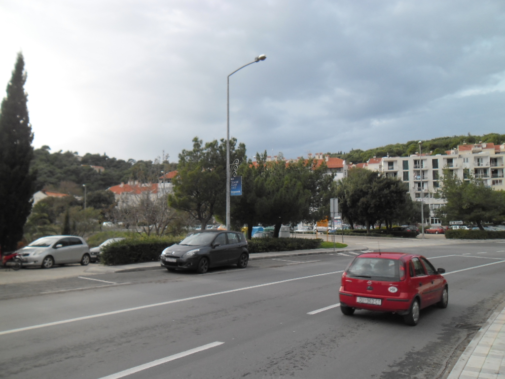 Hladnica, Dubrovnik